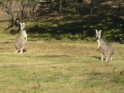 Macropus robustus dans la Hunter Valley, NSW